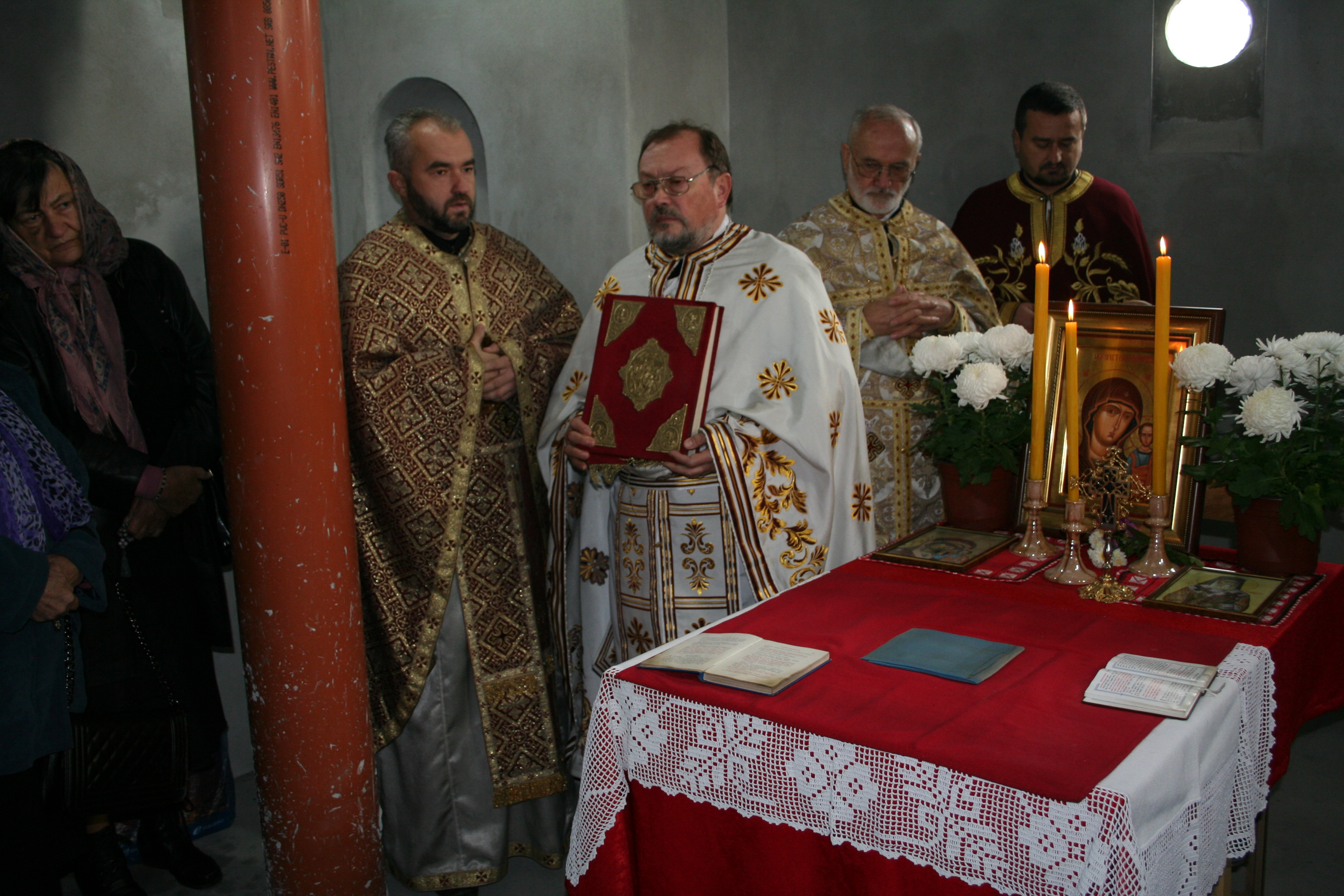 Slava crkve ikone Bogorodice Kazanjske, Provo